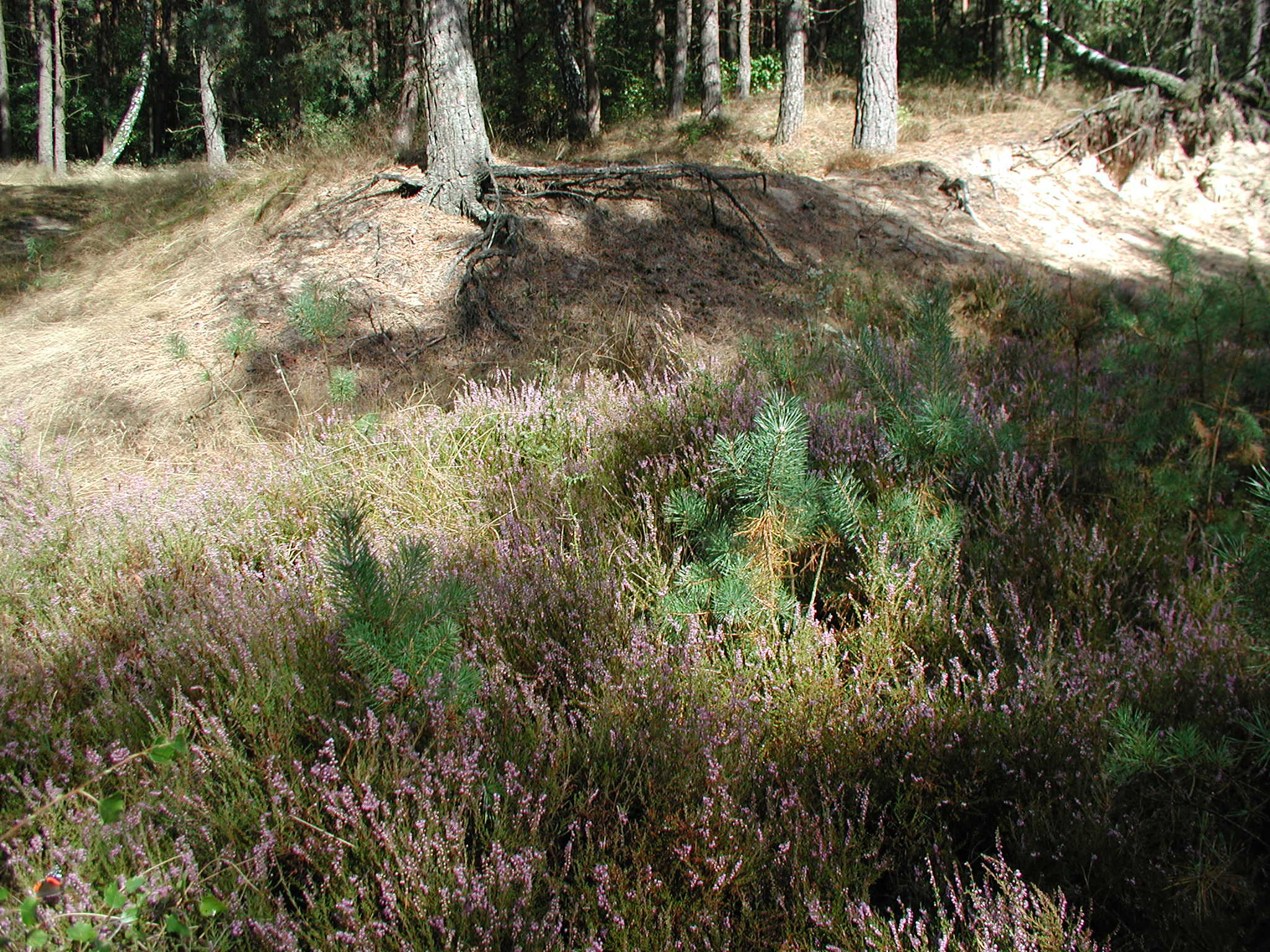 Haselünner Wacholderhain, Emsland